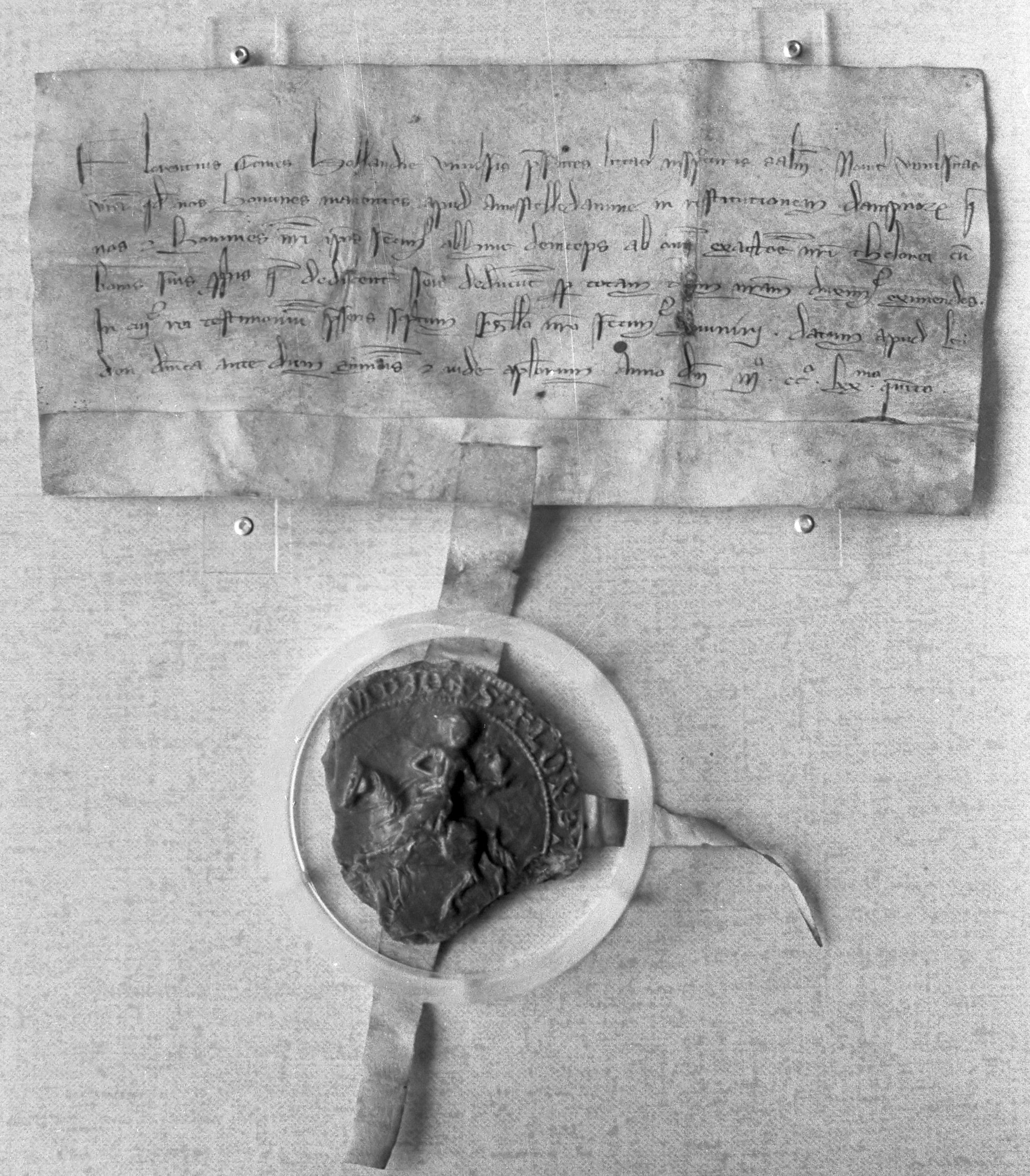 Gemeente-archief Amsterdam, privilege voor Amsterdam van Floris V 22 maart 1973